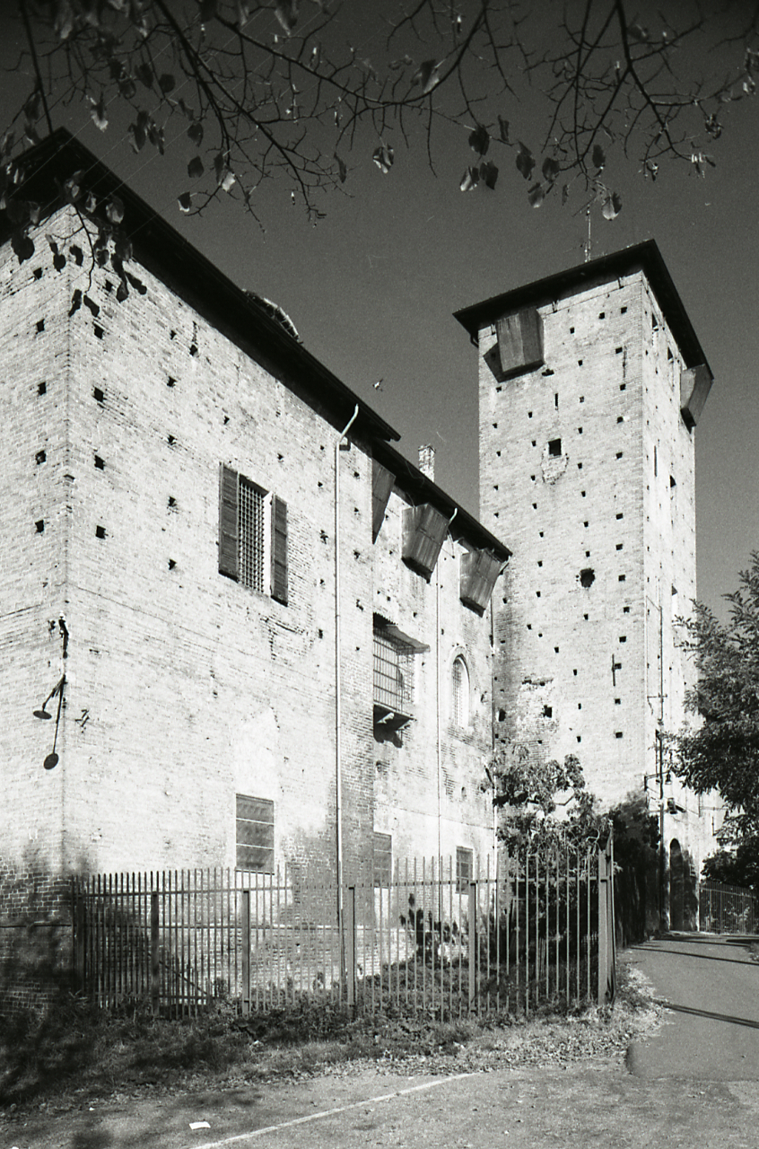 Servizio fotografico : Voghera, 1980 / Paolo Monti. - Strisce: 2, Fotogrammi complessivi: 7 : Negativo b/n, gelatina bromuro d'argento/ pellicola ; 35 mm. - ((Sul portanegativi: N[I]K[MA]T FP4 e iscrizione: "Castello di Voghera 1-7". - Confronta scheda 3562Lpbn01A-07A. - Occasione: Documentazione per la pubblicazione: Vincenti Antonello, "Castelli viscontei e sforzeschi", Milano, Rusconi immagini, 1981. - Fonte: Agenda di Paolo Monti: Nikon Leika 3001-/ Monti 1978 (1978-1982), presso Archivio Paolo Monti. - Fonte: Monografia di Vincenti, Antonello: Castelli viscontei e sforzeschi, Milano, Rusconi immagini (1981)